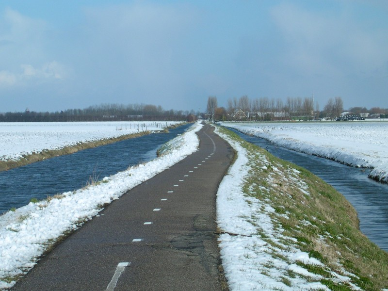 Wijzenddijkje, een dijk langs het water Groote Wijzend tussen Binnenwijzend/Westwoud en Oosterblokker/De Bangert. Wijzenddijkje, a dyke besides the water called Groote Wijzend. The dyke lays right between Binnenwijzend/Westwoud and Oosterblokker/De Bangert.